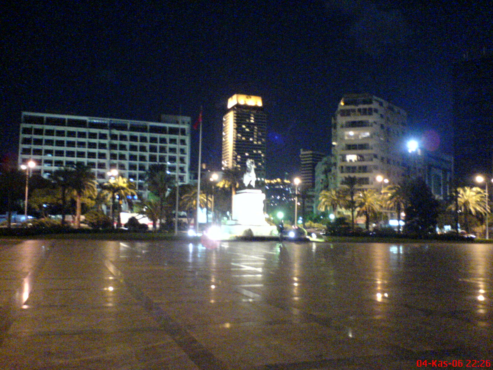 Izmir Cumhuriyet meydani'nın gece görünüşü A night view of Cumhuriyet Square,İzmir